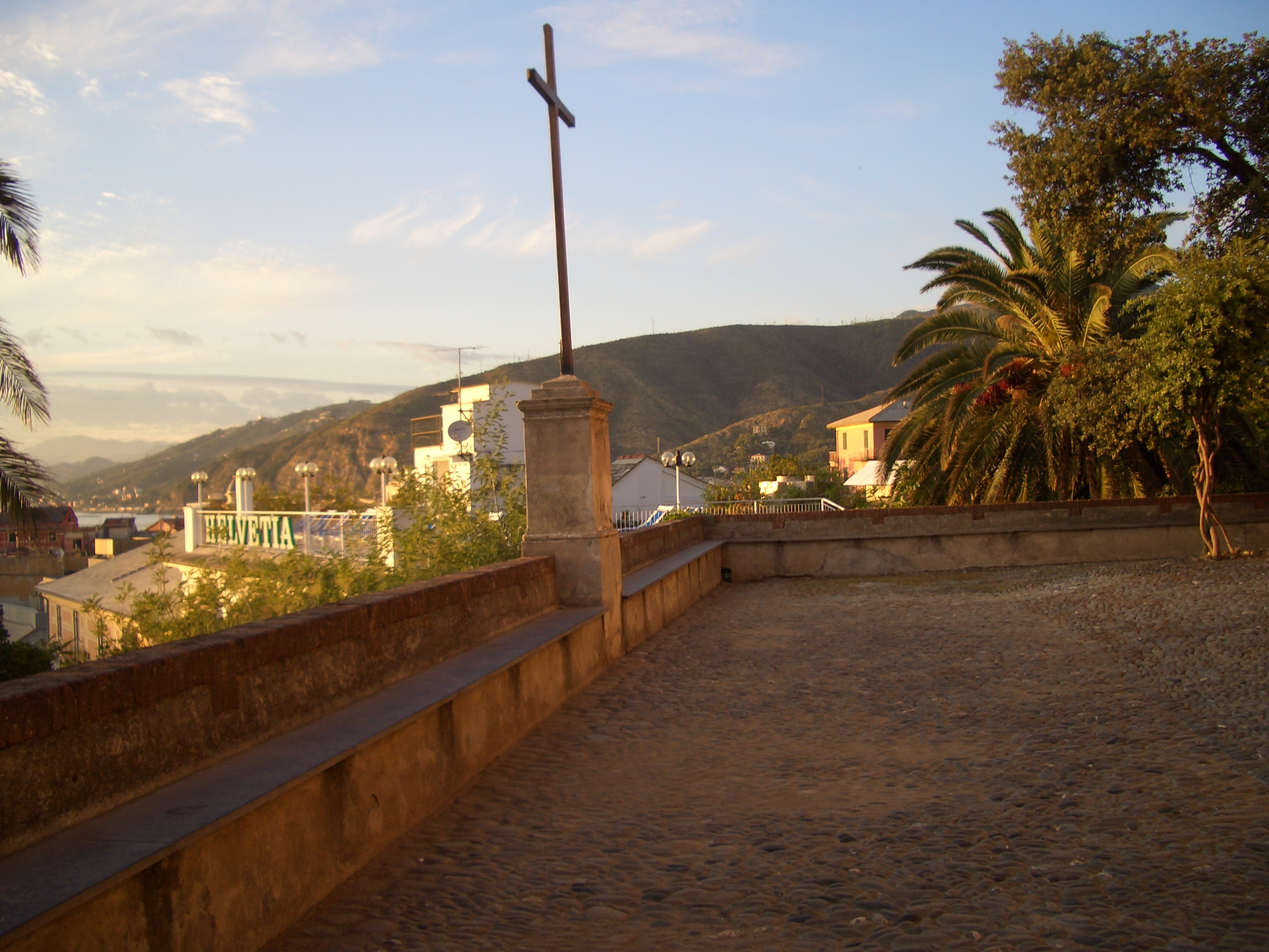 Sestri Levante Convento dei Cappuccini